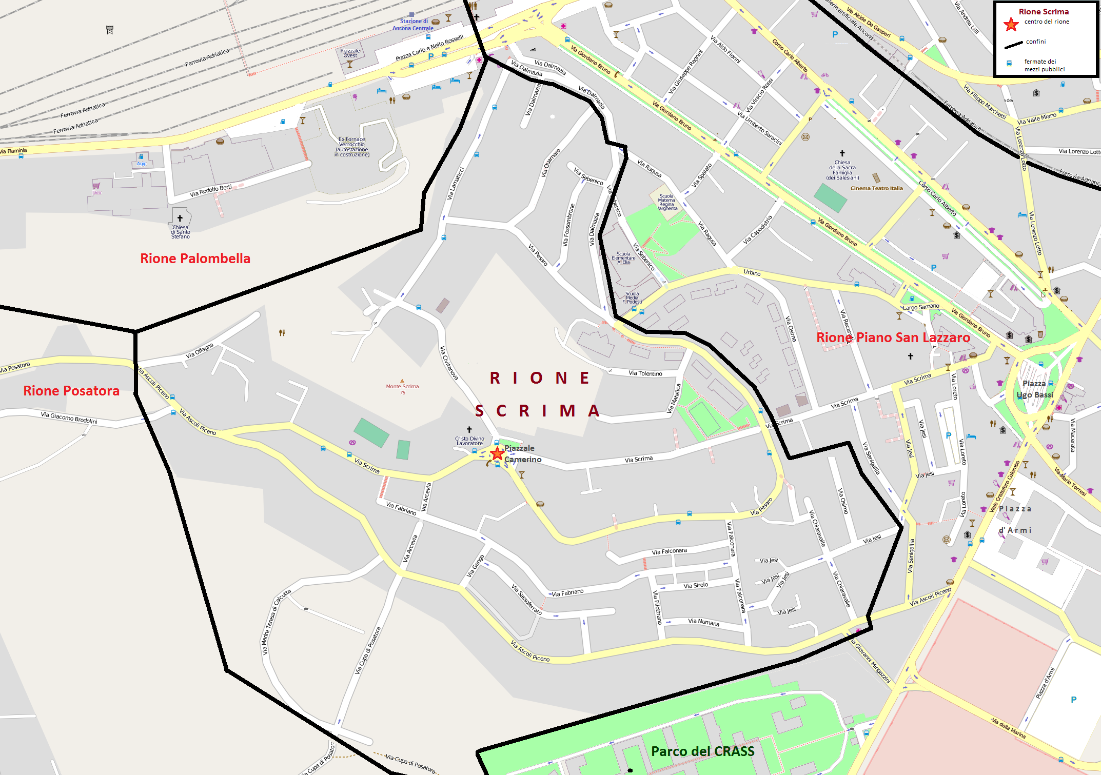 Mappa del Rione Scrima di Ancona, con i confini, le vie, le piazze e i parchi.